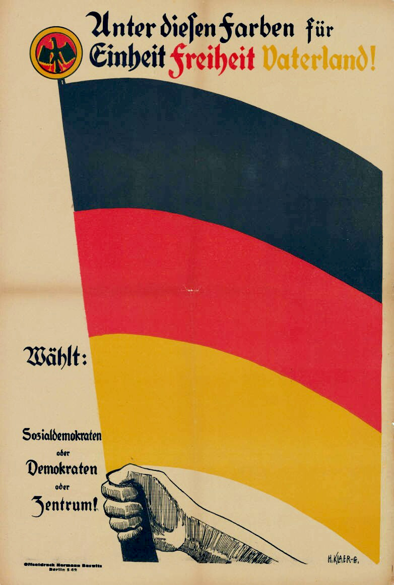 Unter diesen Farben für Einheit Freiheit Vaterland! Wählt: Sozialdemokraten oder Demokraten oder Zentrum!Abbildung:Schwarz-rot-goldene Fahne mit AdlermotivKommentar:Reichstagswahl 1924Plakatart:Motiv-/TextplakatKünstler_Grafiker:H. Klaer-G.Drucker_Druckart_Druckort:Offsetdruck Hermann Baswitz, Berlin S 42Objekt-Signatur:10-043 : 8Bestand:Plakatsammlung Weimarer Republik/NS-Zeit (10-043)GliederungBestand10-18:ZentrumLizenz:KAS/ACDP 10-043 : 8 CC-BY-SA 3.0 DE